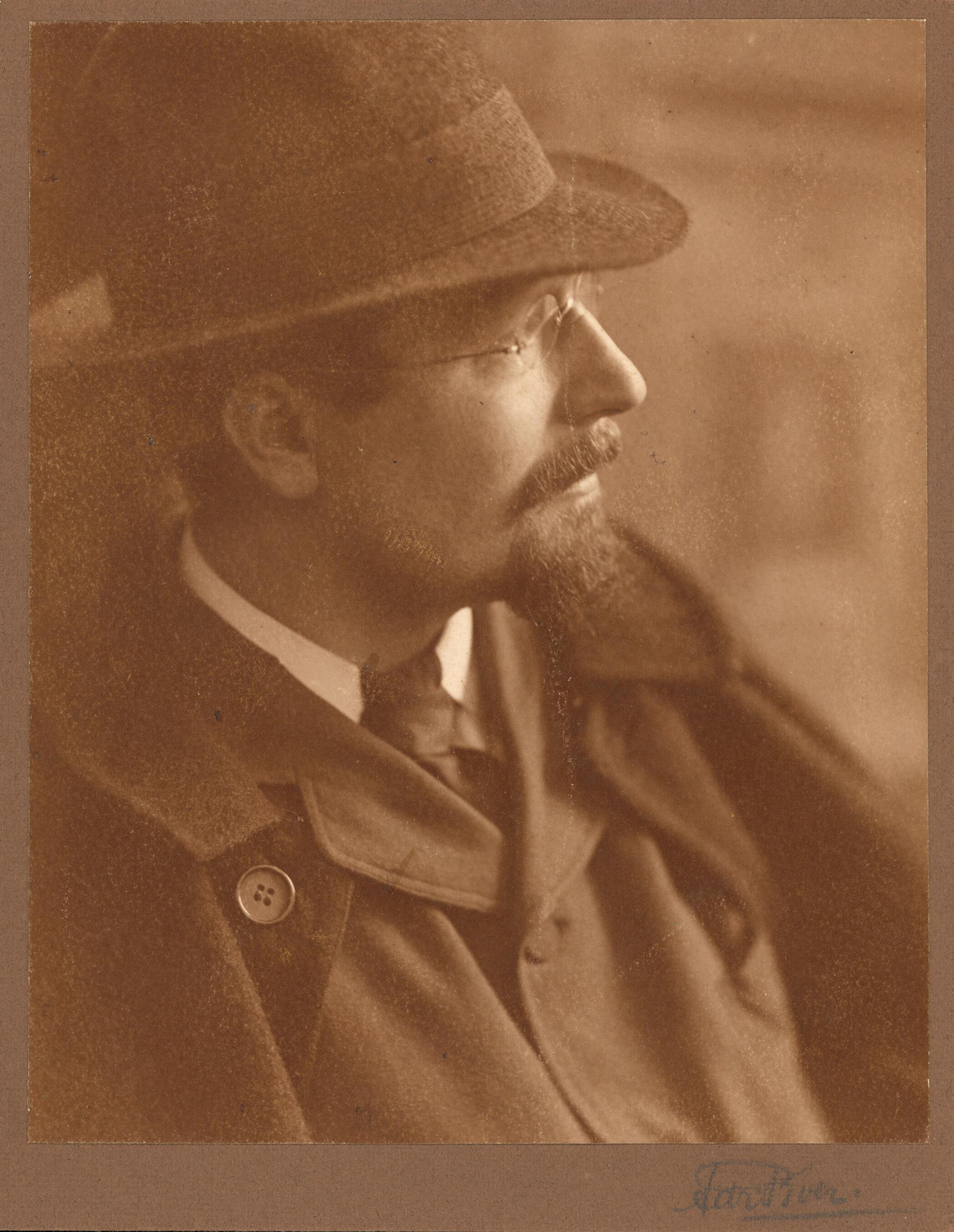 Portret van Ferdinand Oldewelt door Adriaan Boer, ca. 1930